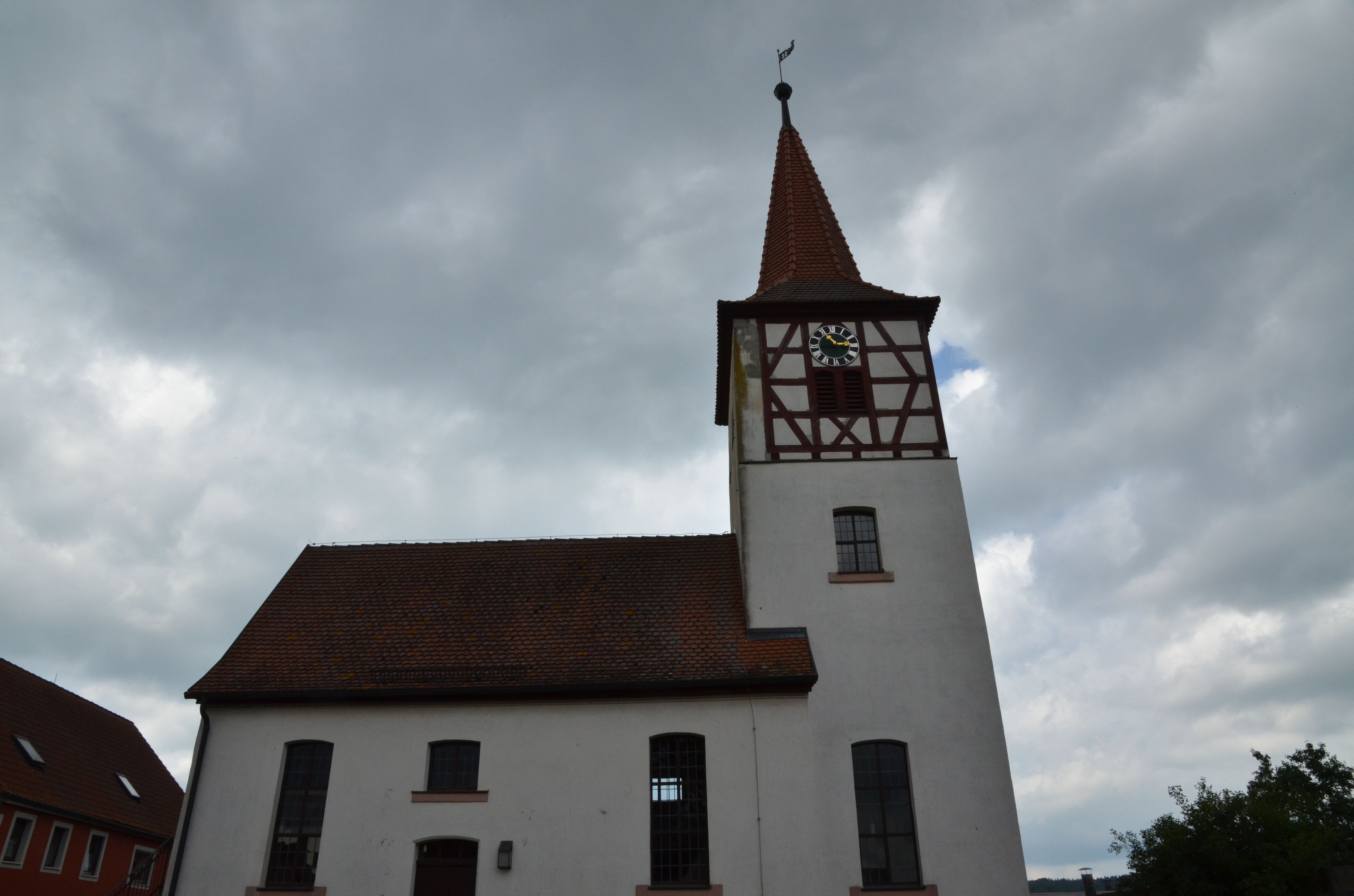 evang.-luth. Kirche St. Kilian und Kunigunde in Berglein